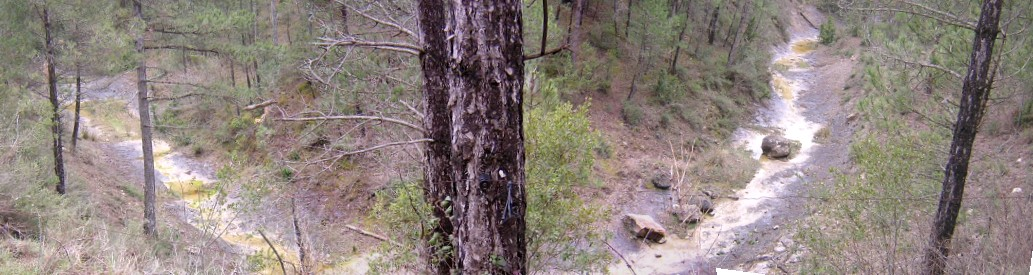 El torrent de Vall-llosera (Monistrol de Calders, Moianès)